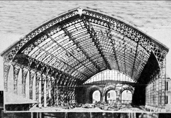 El Centro Cultural Estación Mapocho es un centro cultural chileno, ubicado en Santiago, que ocupa el edificio de la antigua Estación Mapocho de la Empresa de los Ferrocarriles del Estado de Chile, que fue convertida en tal a comienzos de los años 1990. El edificio fue construido entre 1905 y 1912 para albergar una gran estación de trenes y, de esta manera, celebrar el Centenario de la Independencia de Chile. La Estación Mapocho llegó a ser la más importante red ferroviaria nacional.